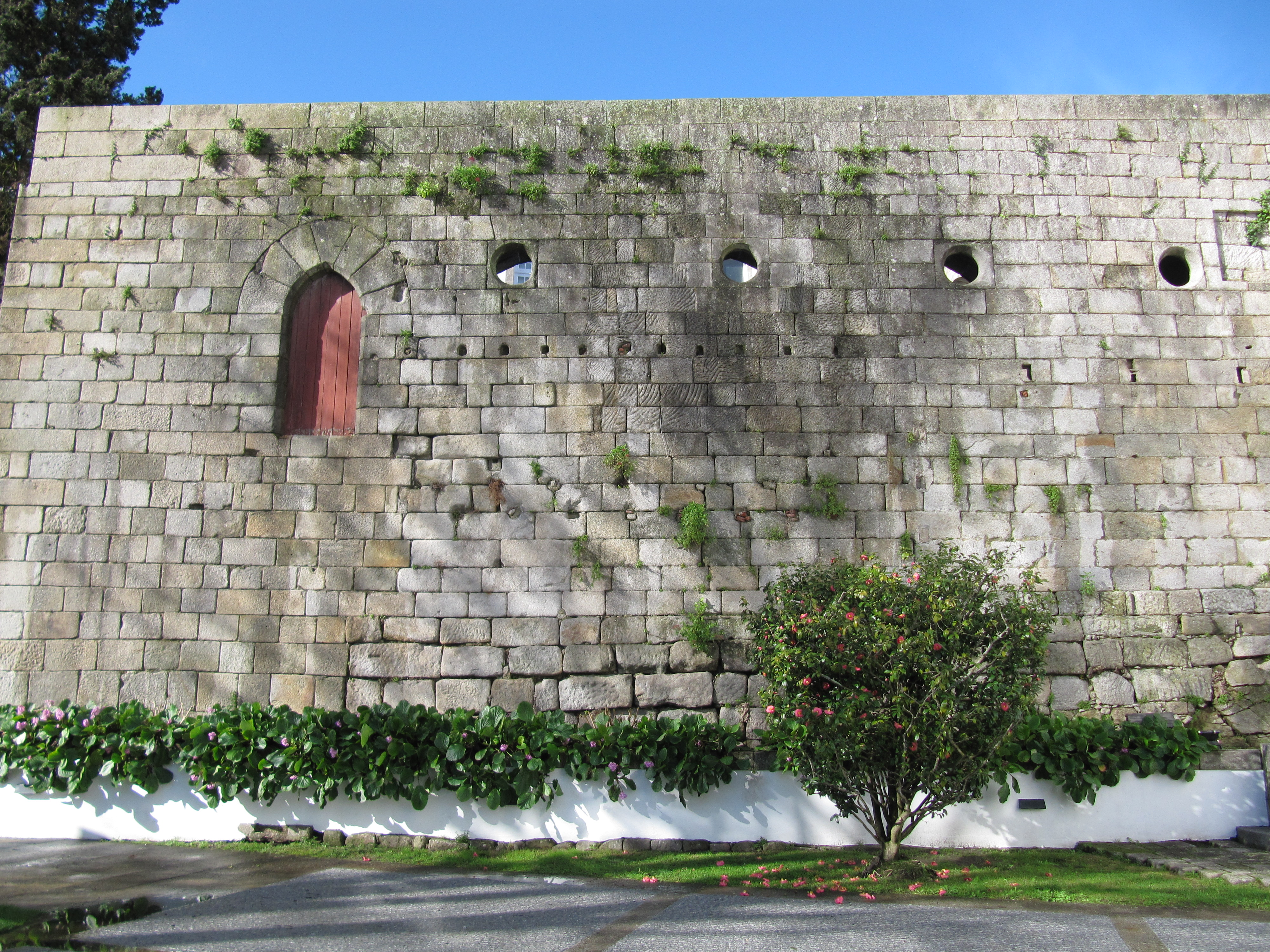 Museu Municipal Guerra Junqueiro